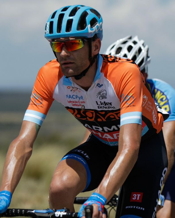 Phillip Gaimon con el maillot de líder del Tour de San Luis 2014 durante la 3ª etapa